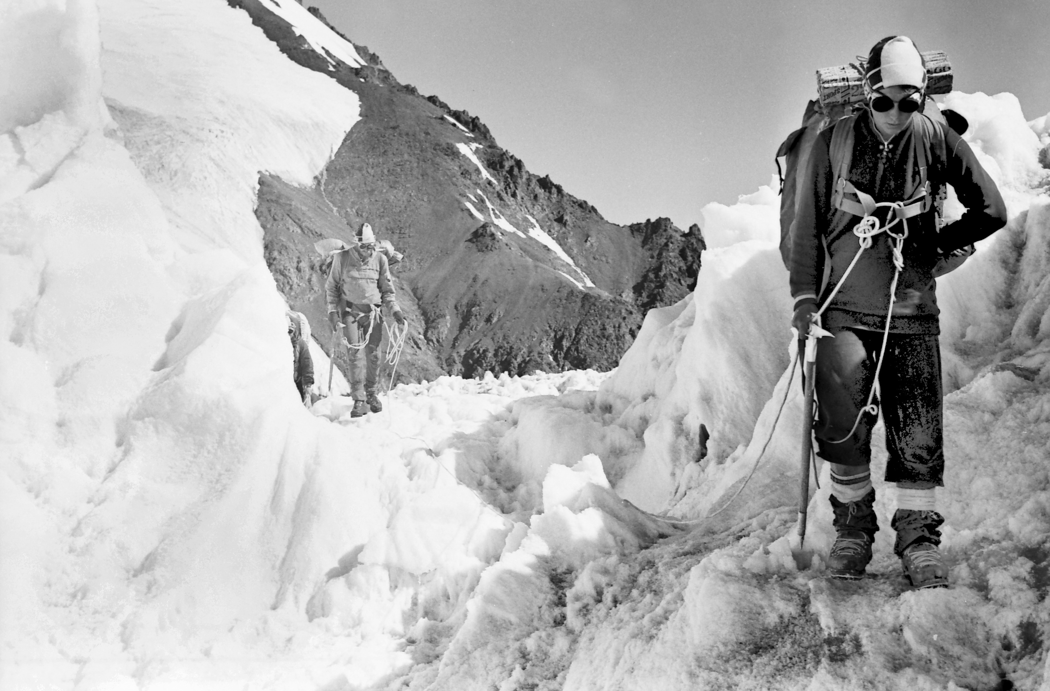 Ekspeditsioon mäetipule "Tartu Ülikool 350". Anu Kallavus.